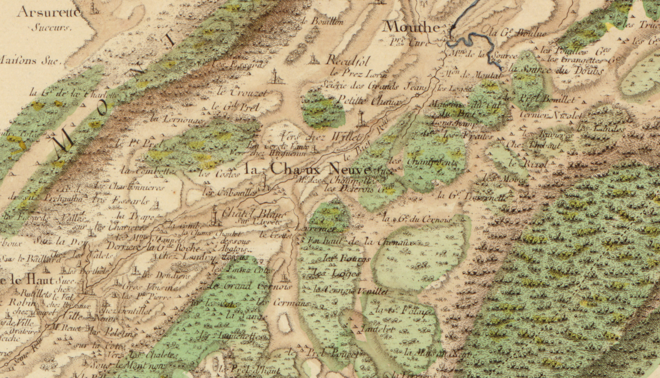 Carte de Cassini n°147 (Nozeroy, zoom sur Chaux-Neuve), 1759.